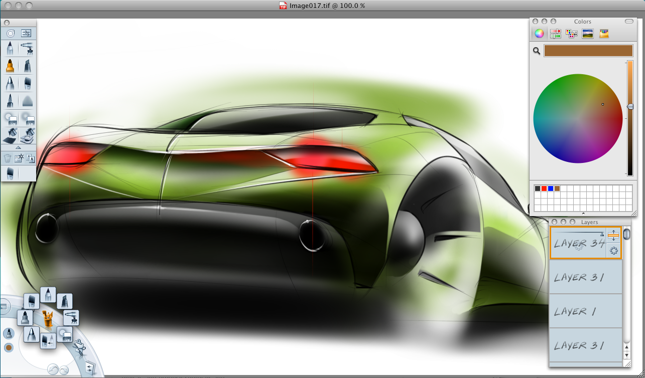 Autodesk SketchBook Pro 2009